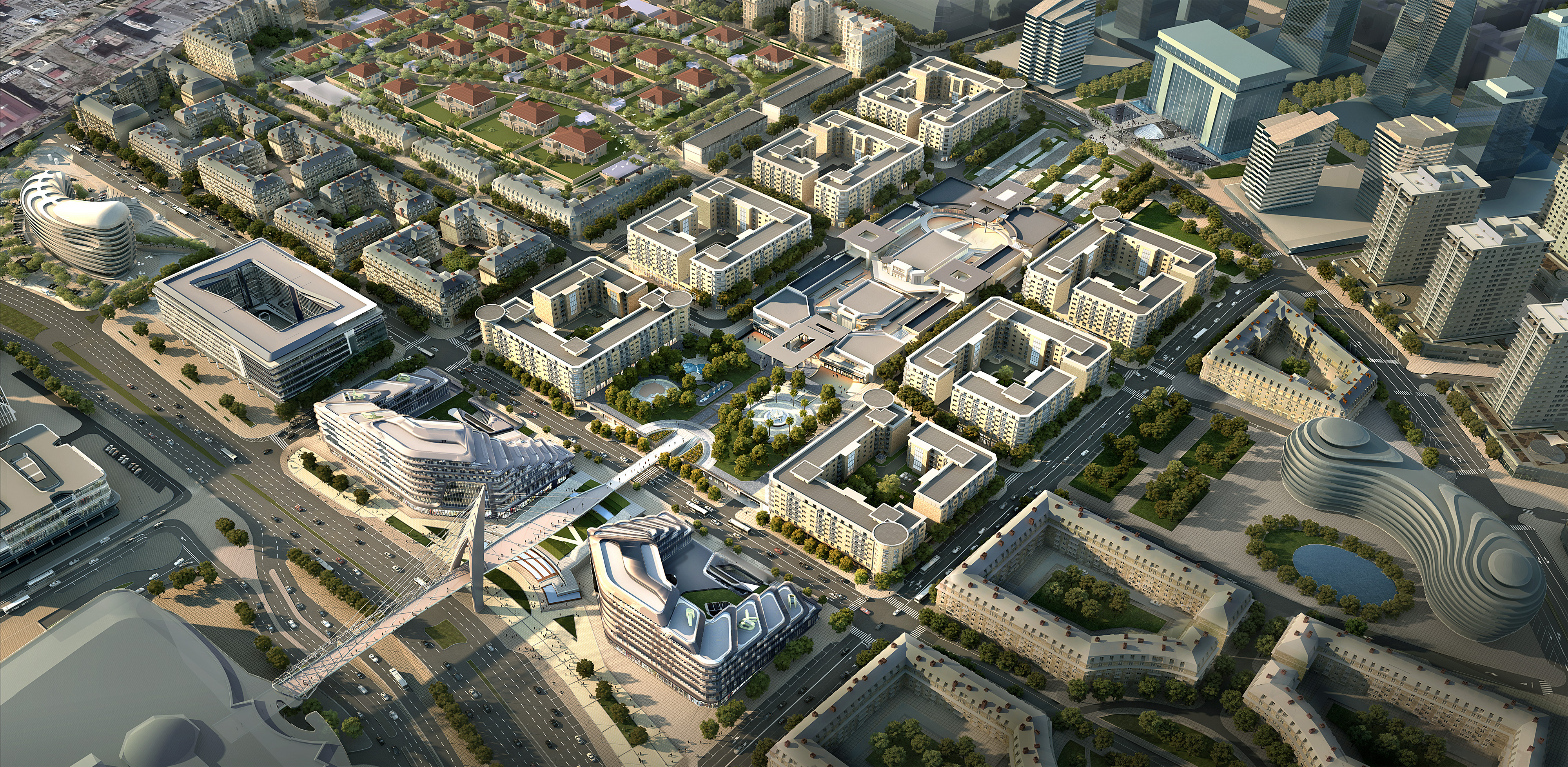 Bakı Ağ Şəhər layihəsi, Nobel prospektinə görüntü